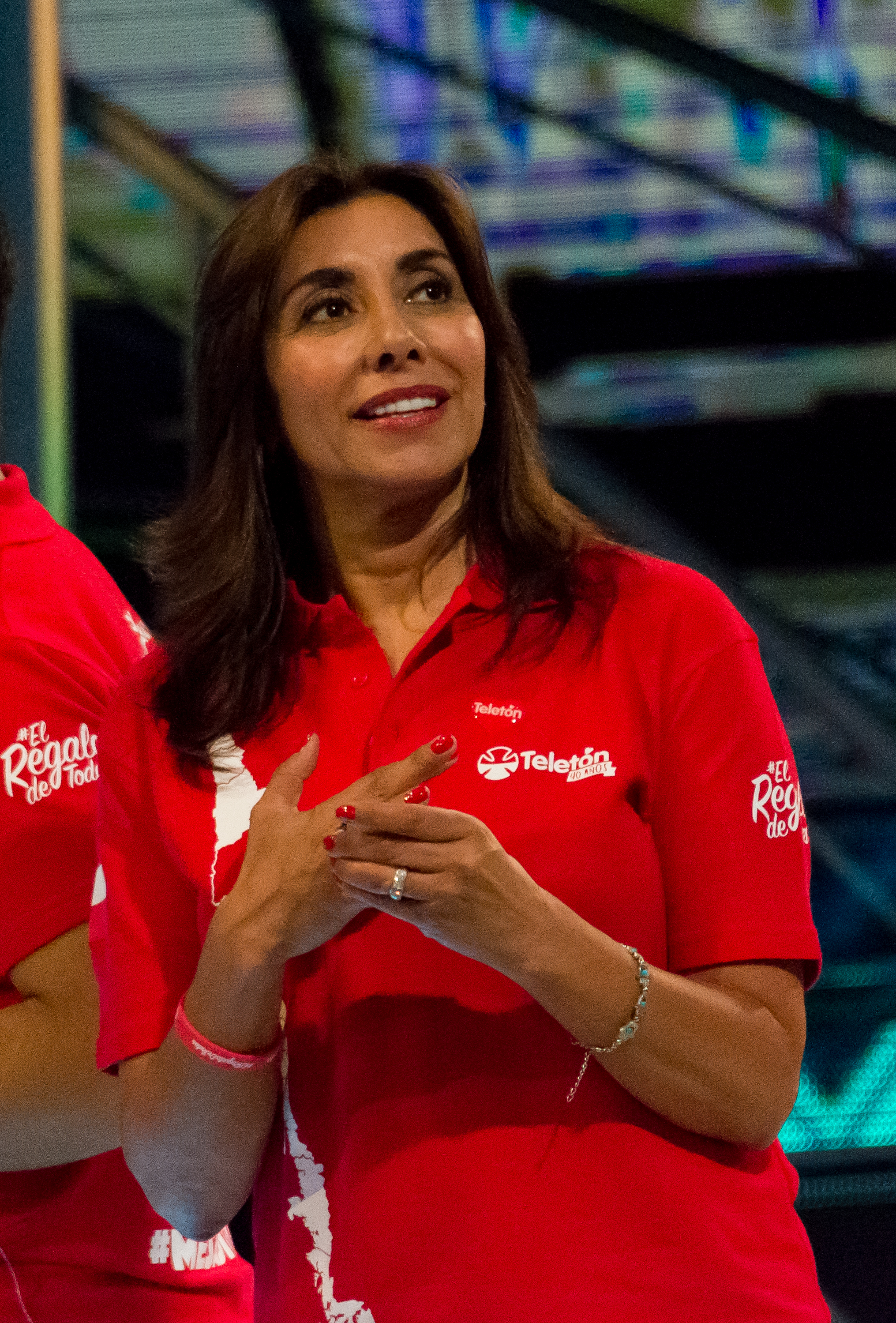 Carmen Gloria Arroyo, Teletón 2018, Teatro Teletón, Santiago, Chile.